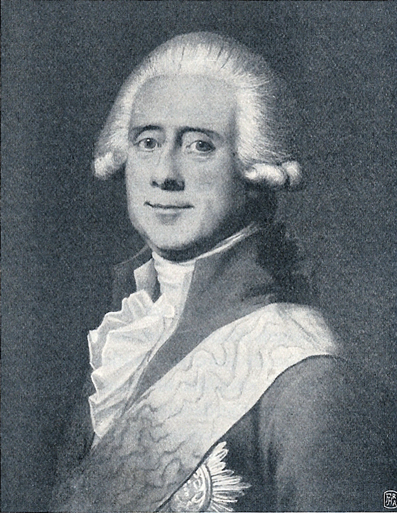 Statsminister Joachim Godske greve Moltke. 1746-1818.